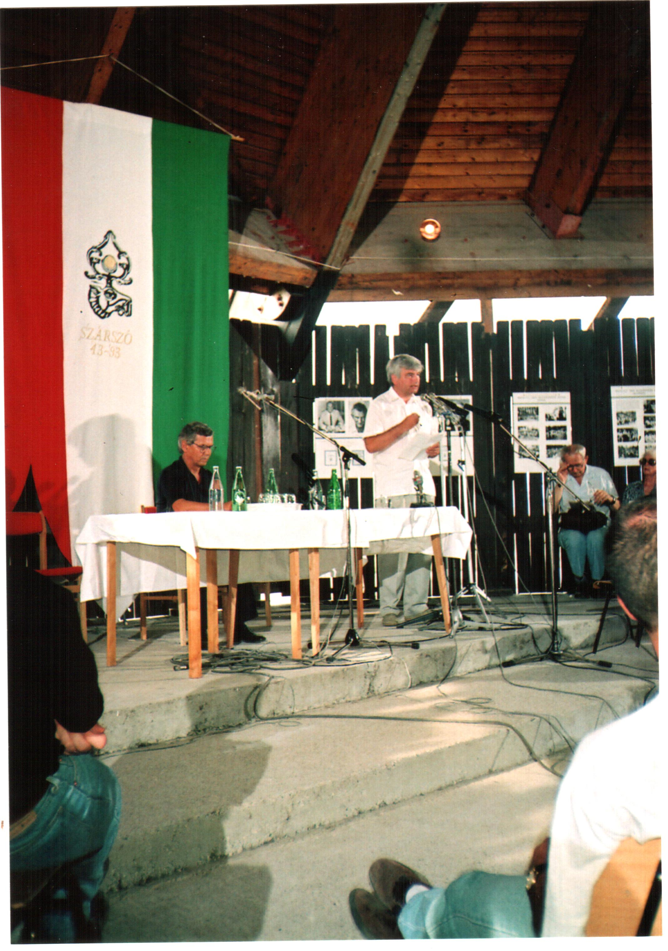 Surján László. A felvétel 1993. augusztus hó 24- én készült Balatonszárszón. Püski Sándor az 1943 –as Szárszói Magyar Élet Konferencia 50. évfordulójának tiszteletére szervezte a találkozót. A találkozón jelen voltak: Püski Sándor, Csurka István (21,22,23, Bíró Zoltán (13), Szűrös Mátyás 28), Jobbágyi Gábor, Surján László (29), Tábori László (32), Bégány Attila (32, 37), Elekes Andor (05, 35) , Füzessy Tibor (14), 1943. augusztus. 23.-28 –a között Püski Sándor Magyar Élet találkozót szervezett nemzeti kérdések megvitatására a Soli Deo Gloria balatonszárszói üdülőjében. Diákok, írók, politikusok, hírlapírók, egyesületi vezetők, munkás- és parasztfiatalok egyaránt a résztvevők között voltak. A vitákban részt vettek a KALOT, az EMSZO és a Hivatásszervezet tagjai is. A megbeszélések témája az 1939 óta tartó világháború., a magyar. nép állapota és a magyar nemzet háború utáni jövője. Az ismertebb előadók és fölszólalók: Németh László (1901-75), Kodolányi János (1899-1969), Veres Péter (1897-1970), Erdei Ferenc (1910-71), Karácsony Sándor (1891-1952), Féja Géza (1900-78), László Gyula (1910-98), Szabó Pál (1893-1970), Jócsik Lajos (1910-80), Nagy István (1904-77), Szabédi László (1907-59). A legelevenebb érdeklődést Erdei Ferenc és Németh László vitája váltotta ki. Erdei az esélyek alakulásából már kirajzolódni látszó 'szocializmus', utóbbi a kapitalizmus és a szocializmus közötti 'harmadik út' mellett érvelt. A résztvevők döntő többsége az utóbbival rokonszenvezett. Források: Szárszó '93 Az 1993 évi szárszói tábor előadás és megbeszéléssorozata Püski, Budapest, 1993 Borbándi Gyula: A magyar népi mozgalom. New York, 1983. (és Bp., 1989:336.) - Szárszó 1943. Budapest, 1983. - Püski Sándor: Könyves sors - magyar sors. Budapest, 2002. Őrző a strázsán Somodi István: Szárszó – Modell vagy emlék?